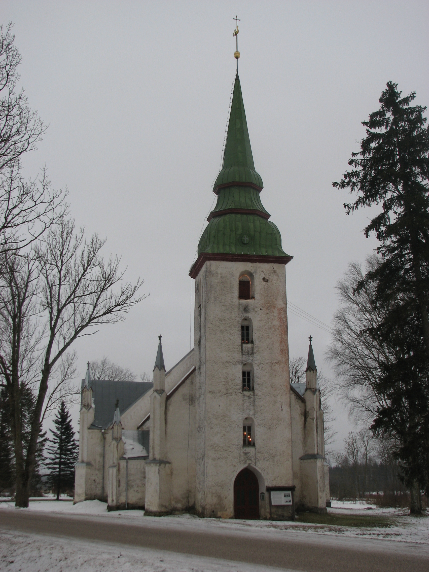 Kursi Church, Kursi, Estonia. Year 2008